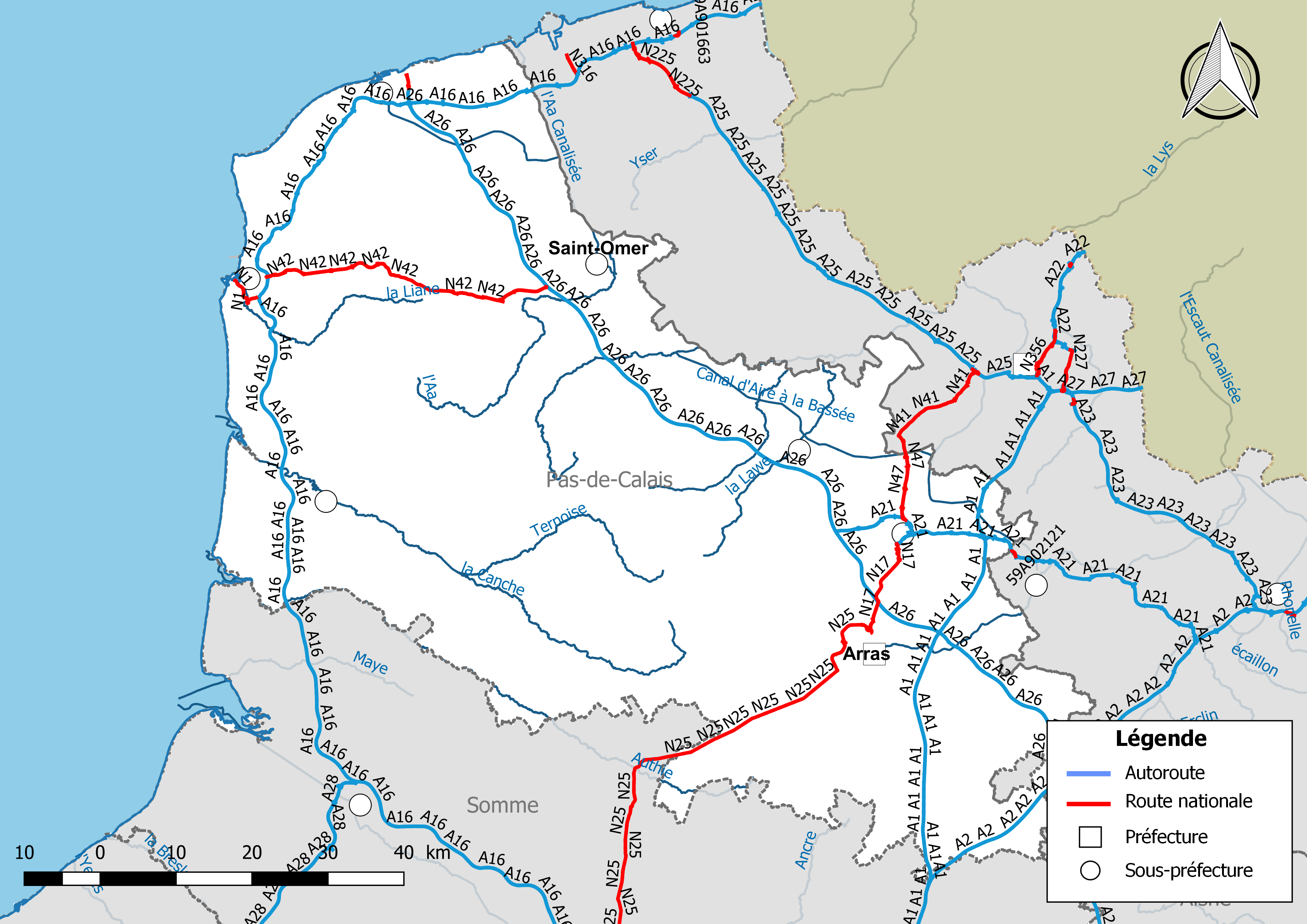 Carte du réseau routier national, constitué des autoroutes et des routes nationales, dans le département du Pas-de-Calais (France). Situation au 1er janvier 2019.